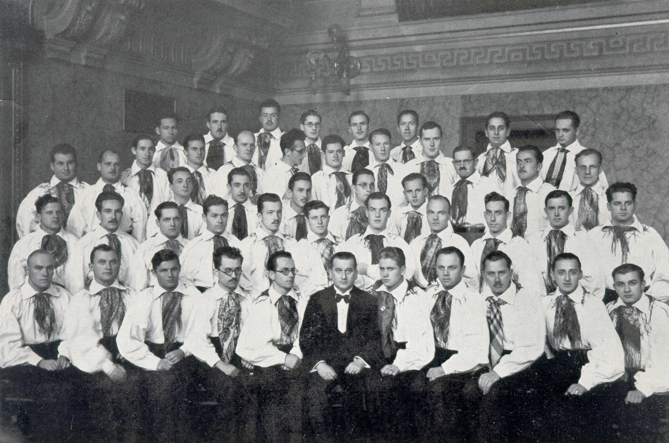 Akademski pevski zbor v Ljubljani z dirigentom Francetom Maroltom